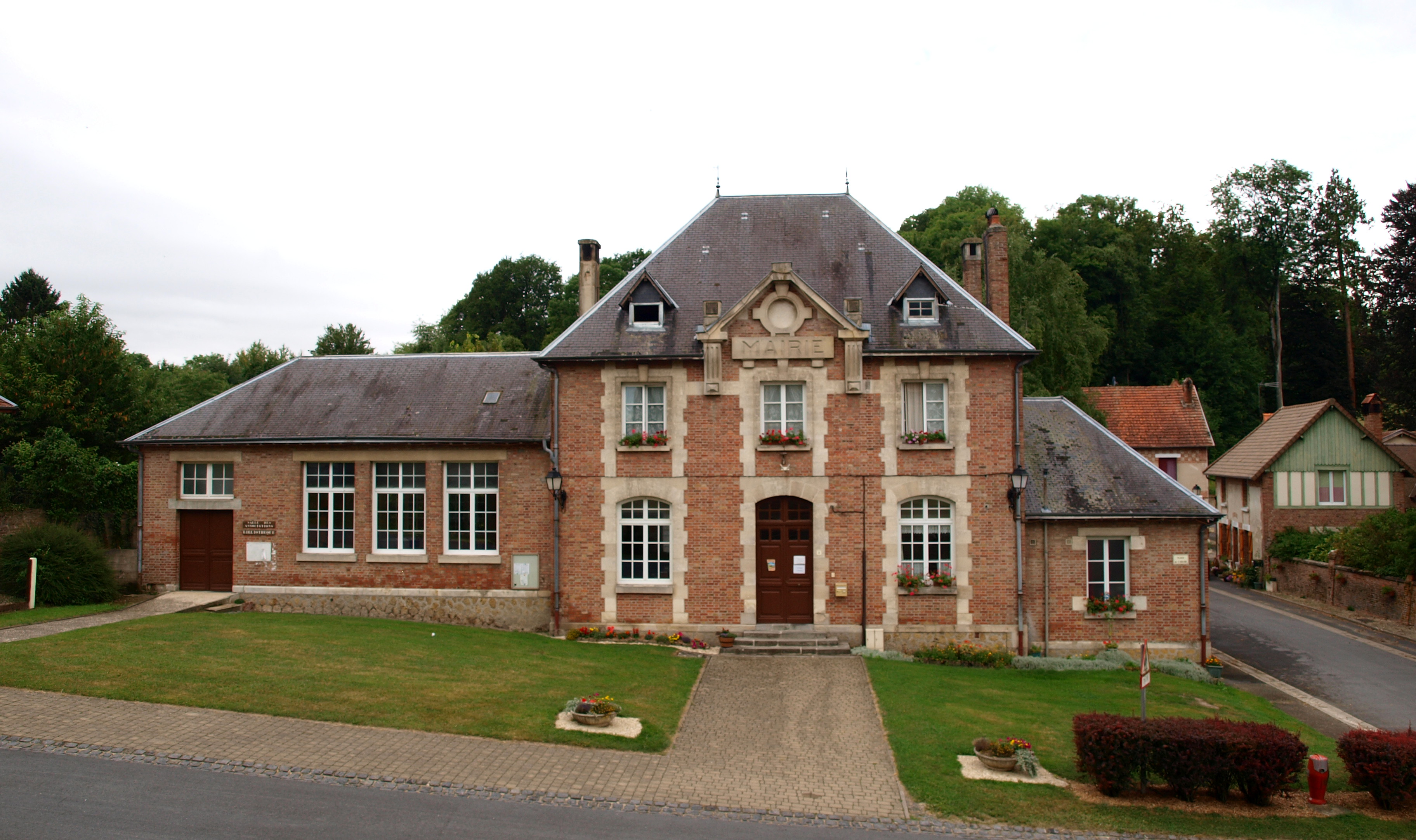 Savigny-sur-Aisne (Ardennes, France) ; mairie